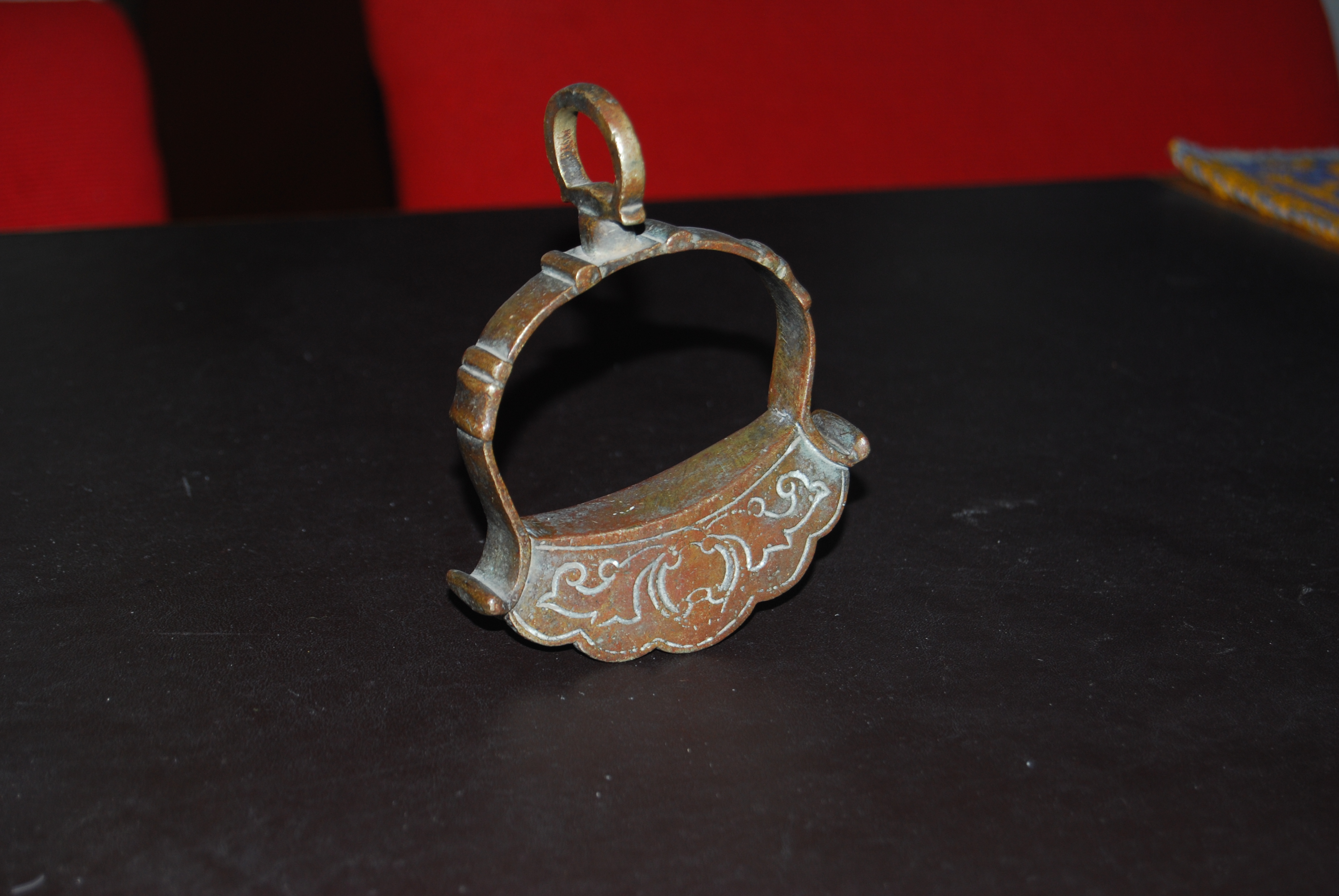 Estribo de los llamados de "media campana" de bronce, hallado en la patagonia argentina.